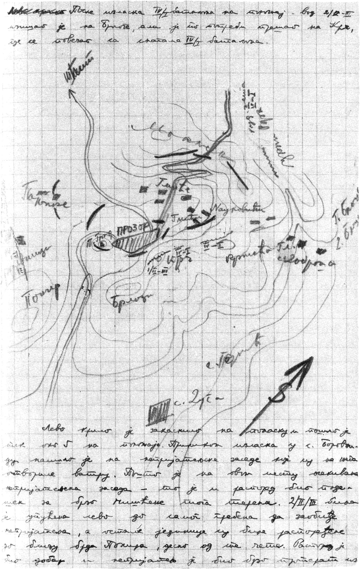 Srpskohrvatski / српскохрватски: Partizanski plan napad na Prozor. Nacrtao Velimir Jakić u Dedijerov dnevnik.